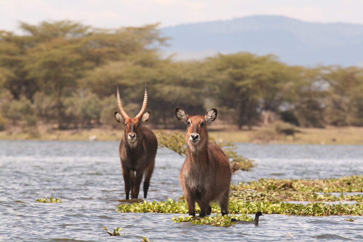 Waterbuck (Kobus ellipsiprymnus)at Lake Naivasha, Kenya